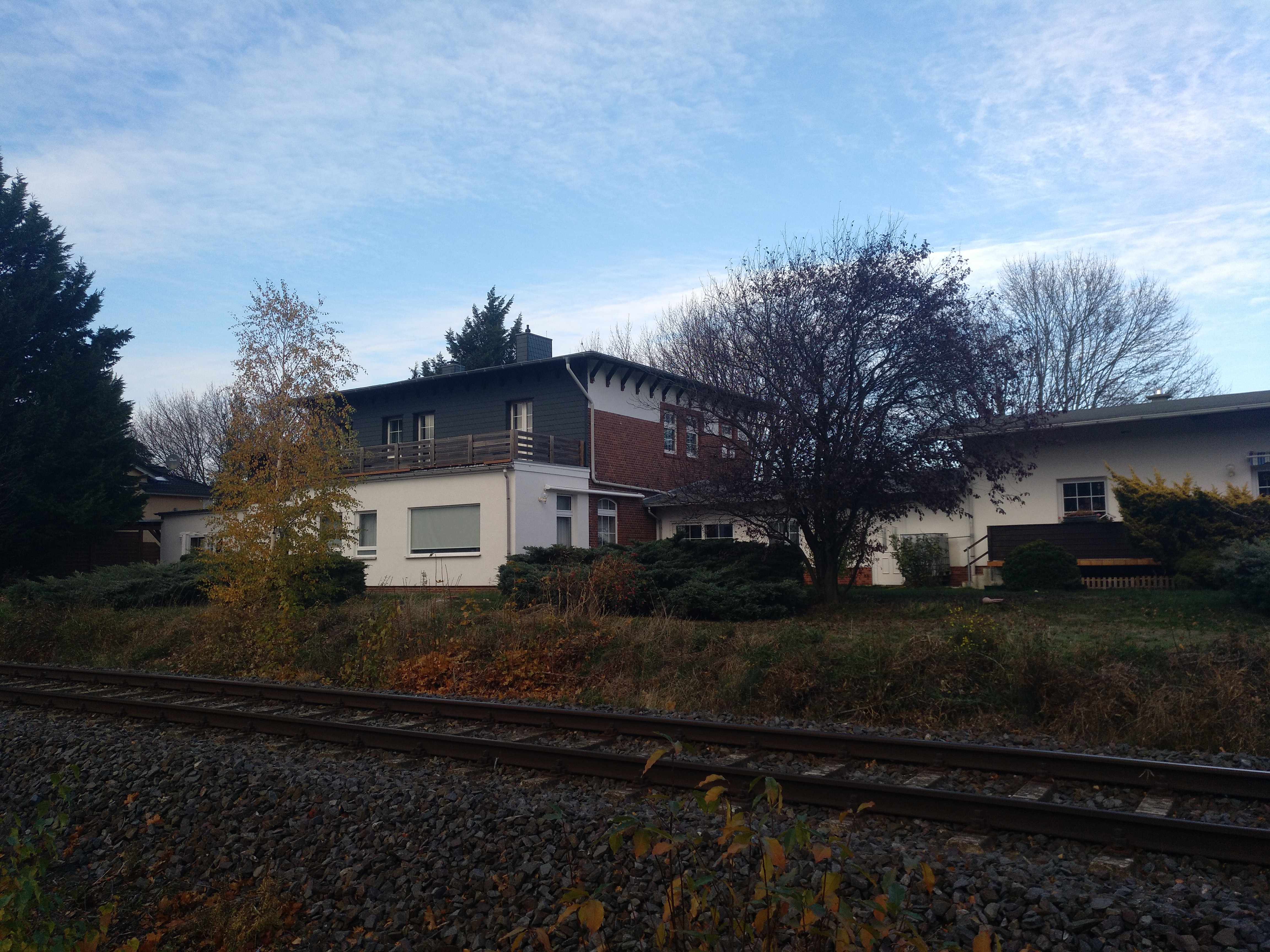 Südblick auf den ehemaligen Bahnhof Harlingerode, November 2018